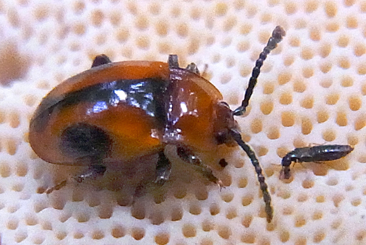 Mycetina cruciata aus Ostungarn, Zemplen-Bergland auf Baumpilz am 16. Juli 2015